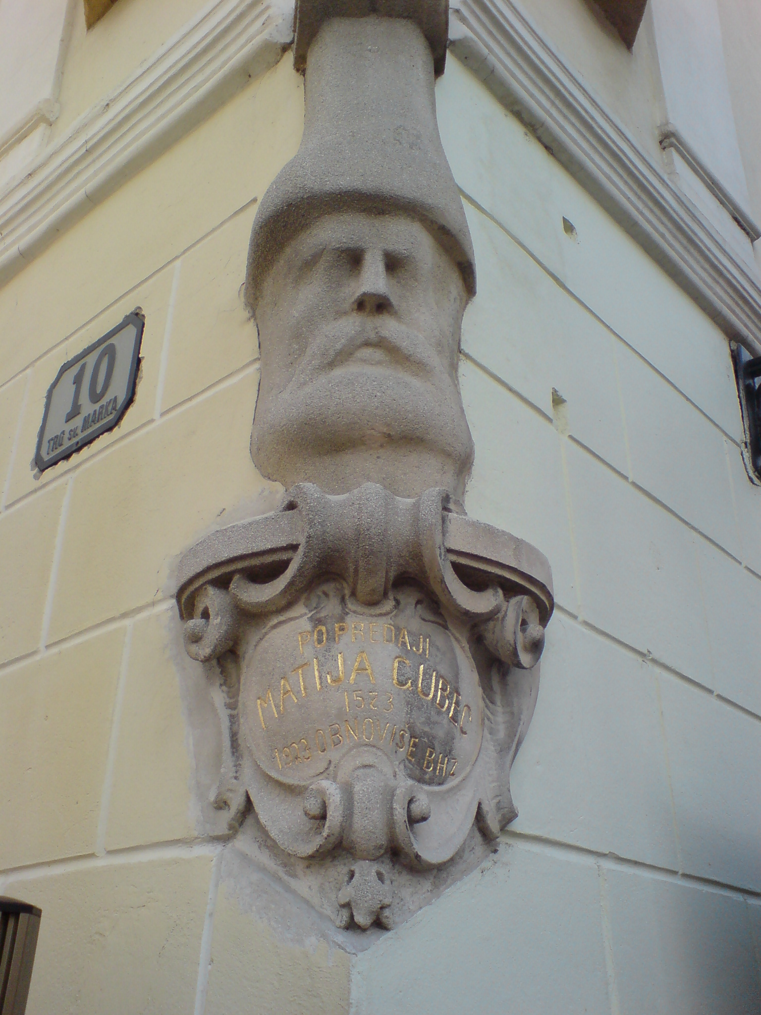 Zagreb